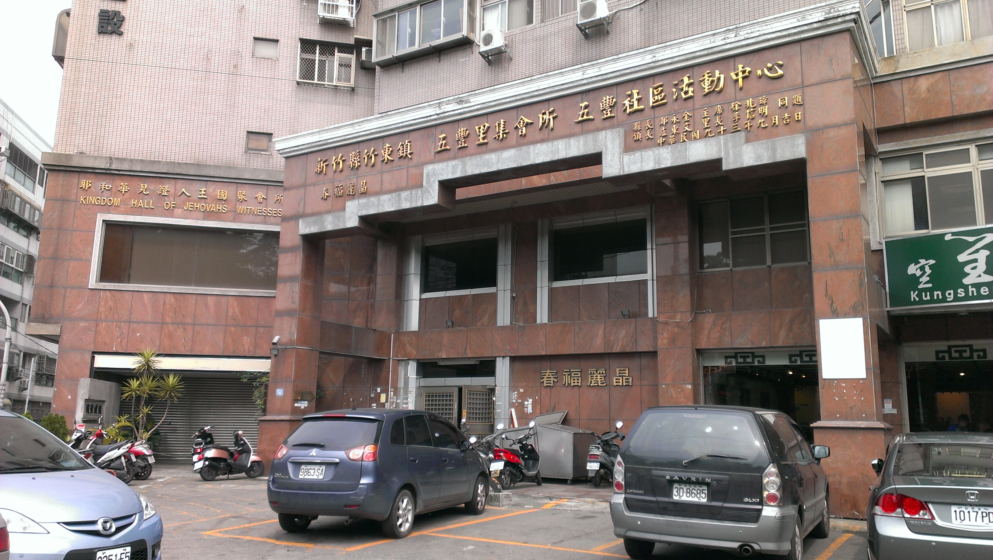 來自台灣新竹縣竹東鎮之五豐里集會所，以及里民活動中心。